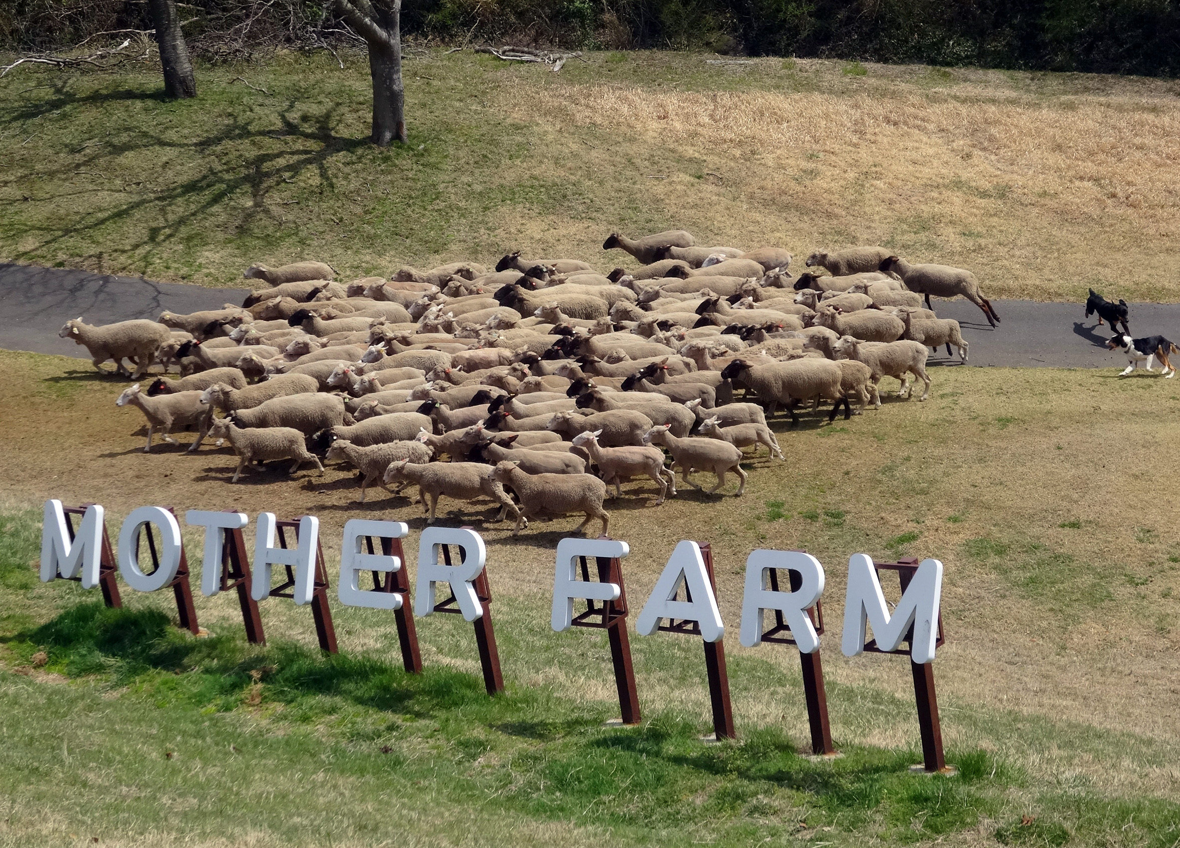 羊の大行進（2015年撮影）